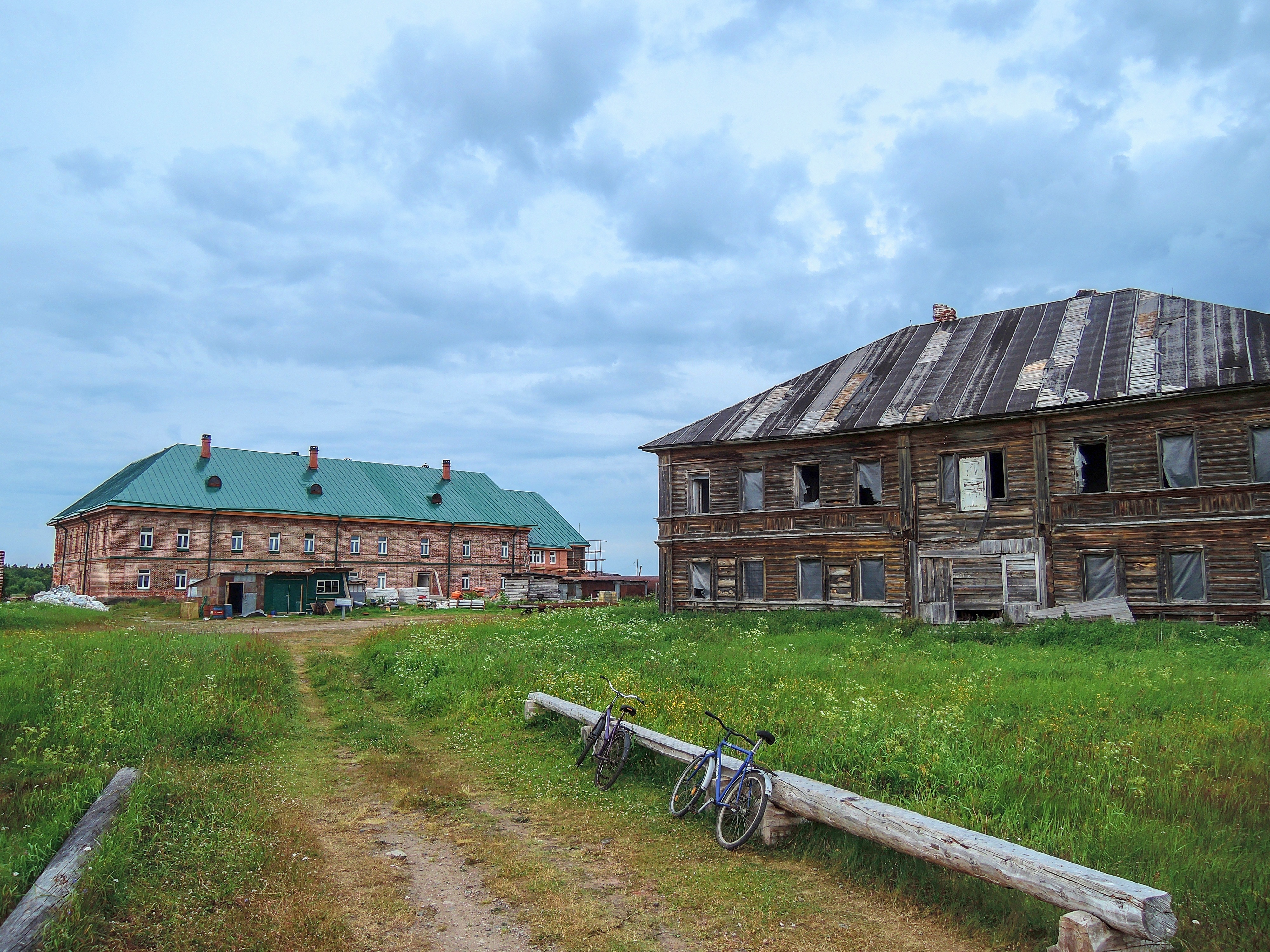 Poustevna svatého Sergeje na ostrově Velká Muksalma